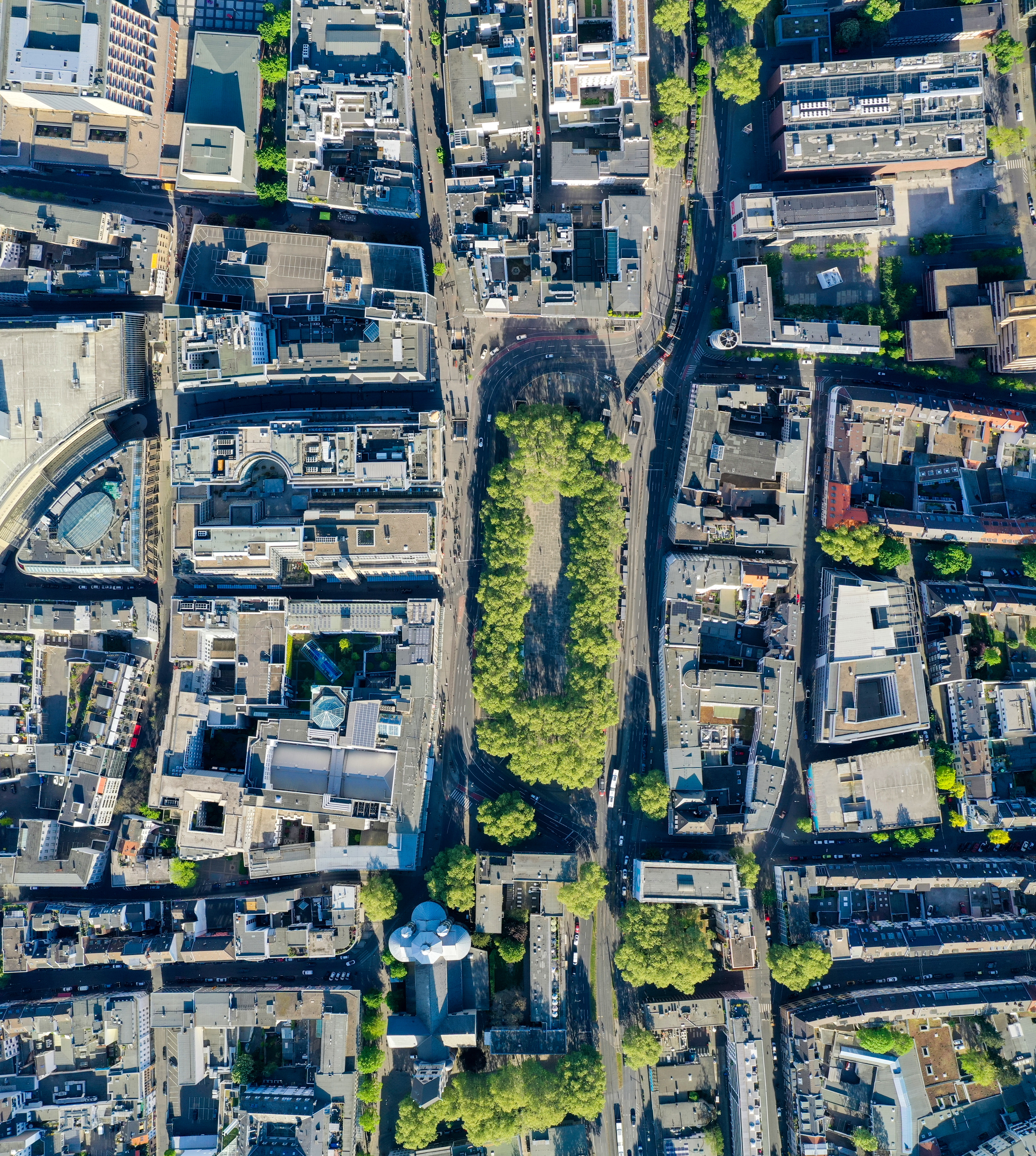 Der Kölner Neumarkt ist der zentrale Platz der Stadt. In diesem orthogonalen Foto aus etwa 300 Metern Höhe an einem Donnerstag Spätnachmittag erscheint der Platz sehr leer. Das liegt an der damals herrschenden COVID-19-Pandemie. Das Foto besteht aus ursprünglich 5 Einzelbildern und zeigt den Platz in Ost-West-Richtung. Norden ist also links im Bild. Die Höhenfreigabe für diesen Flug beruhte auf Ausnahmegenehmigungen der Stadt Köln, der Bezirksregierung Düsseldorf und der Deutschen Flugsicherung. Das Foto steht unter der CC-BY-SA-4.0 Lizenz und darf, auch in Ausschnitten, nur unter Angabe von Ross und Reiter verwendet werden, das heißt mit Namensnennung des Fotografen und der Angabe dieser Webseite hier.